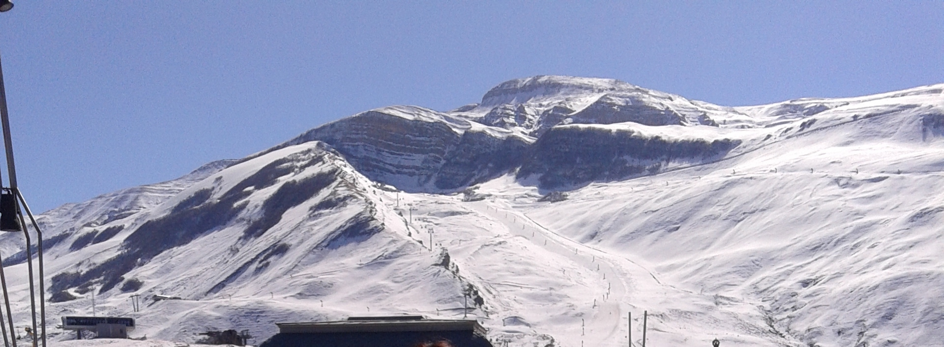 Şahdağ